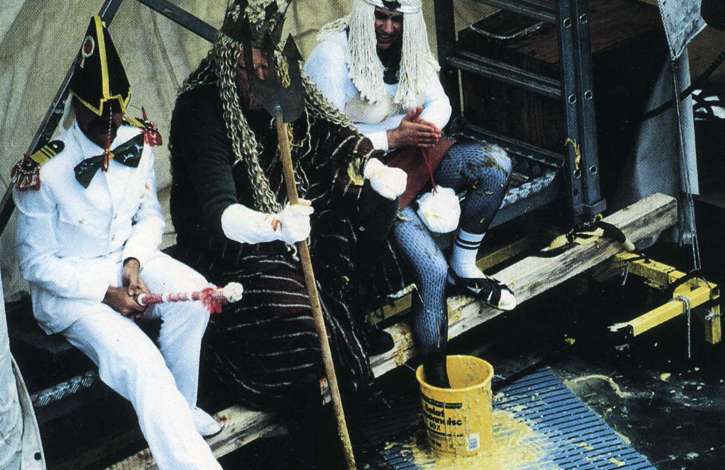 Äquatortaufe